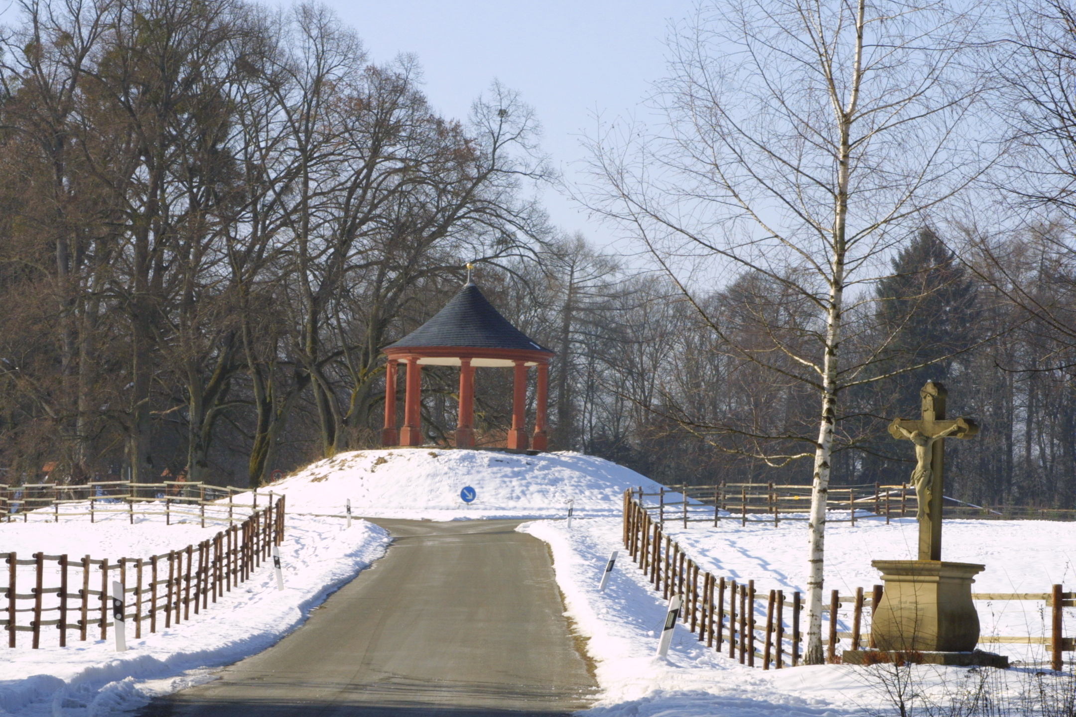 castle Greifenstein near Heiligenstadt (Franconia)